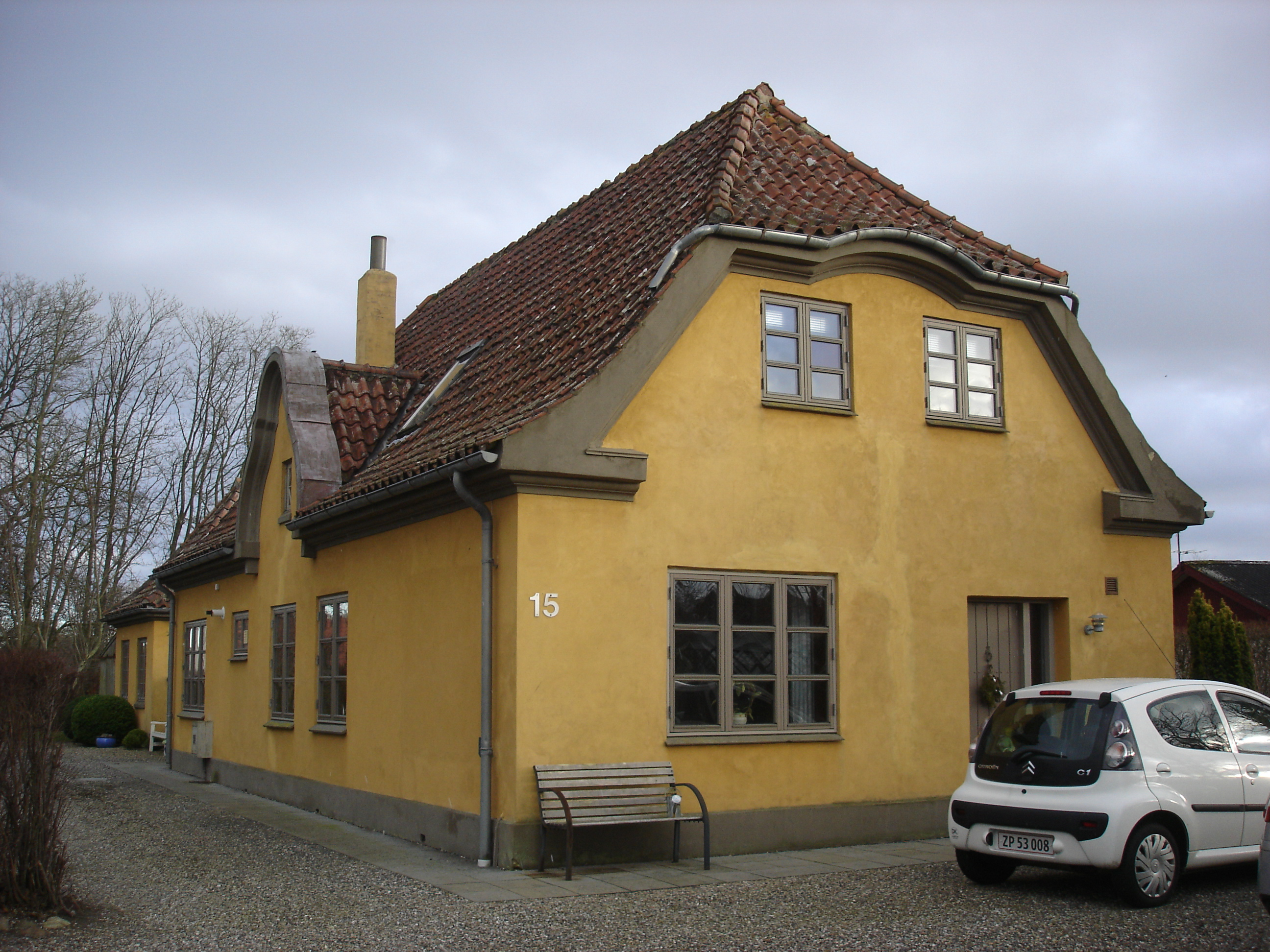 Havbro Station fra vejsiden